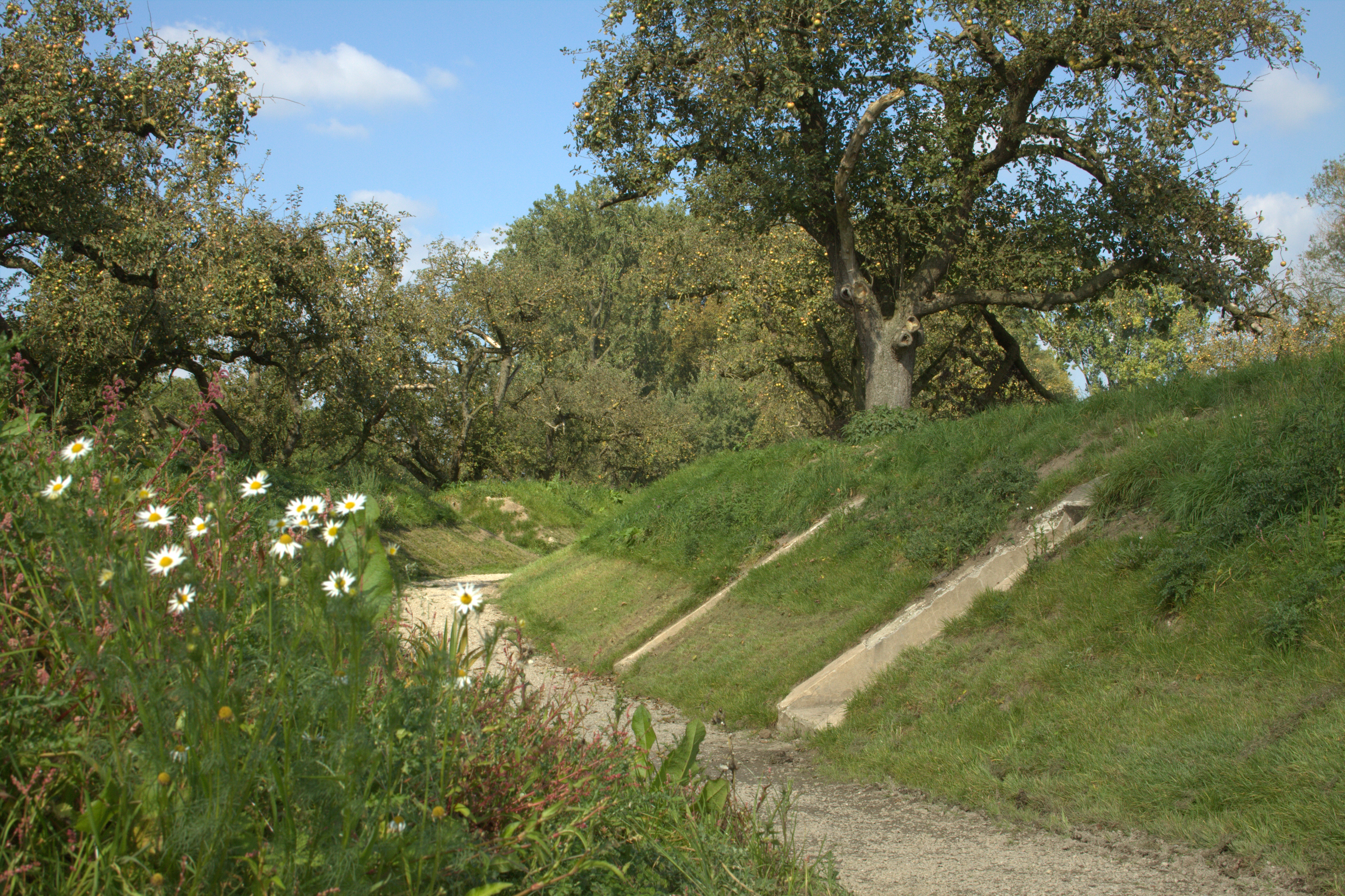 Een reconstructie van een loopgraaf uit de Eerste Wereldoorlog aan het Werk aan de Groeneweg in Schalkwijk.